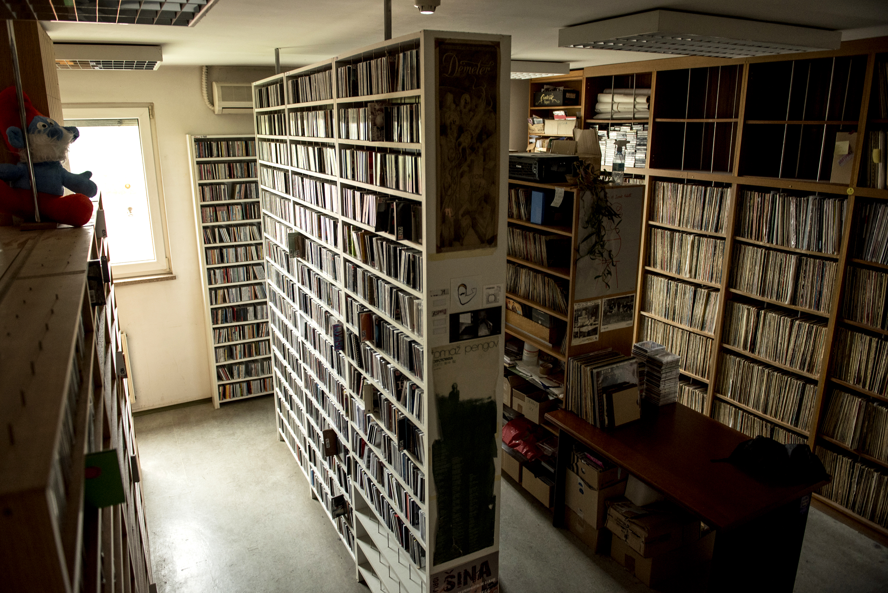 Fonoteka RŠ